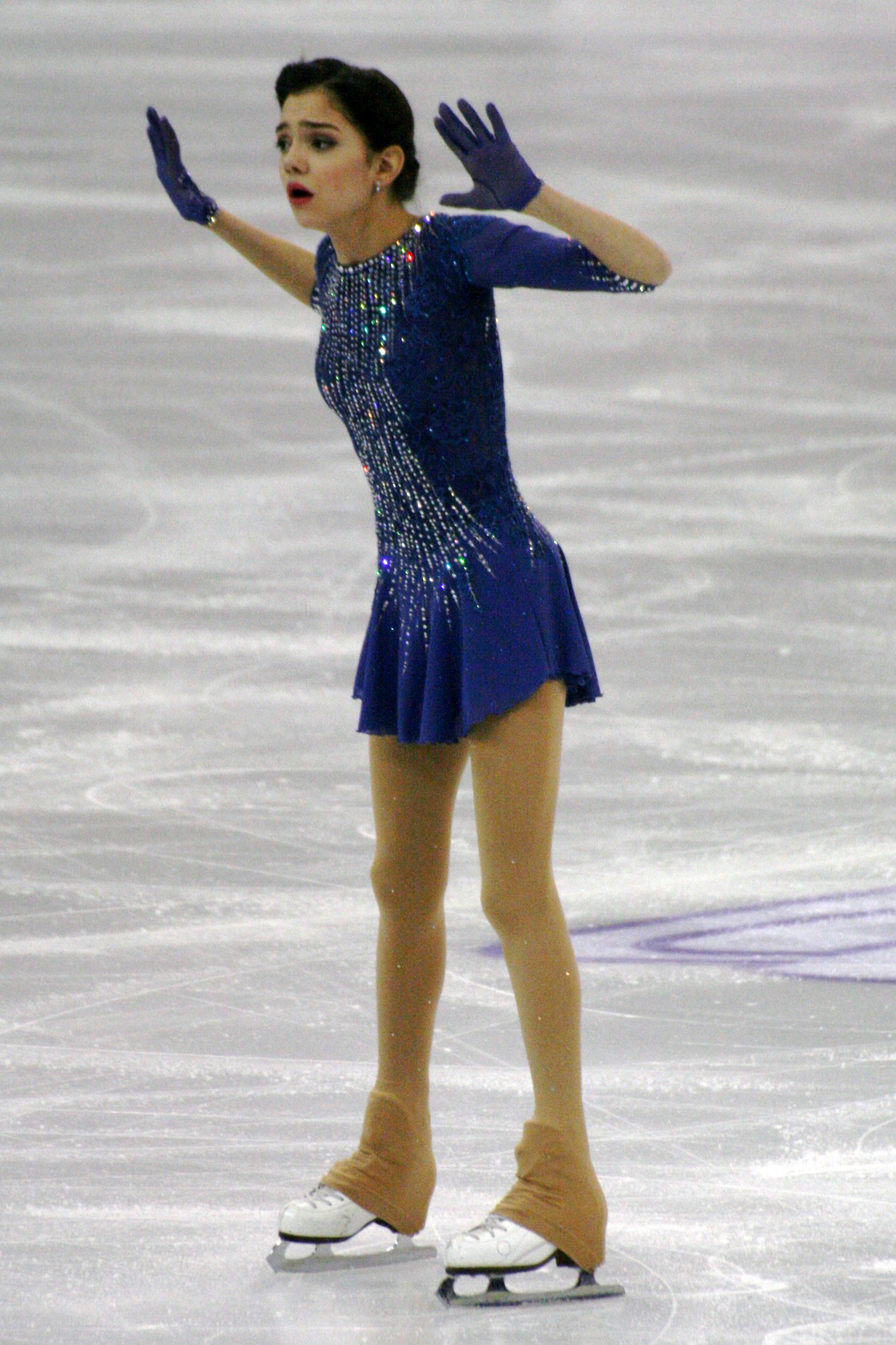 Евгения Медведева (Россия) на финале Гран-при по фигурному катанию 2015-2016.